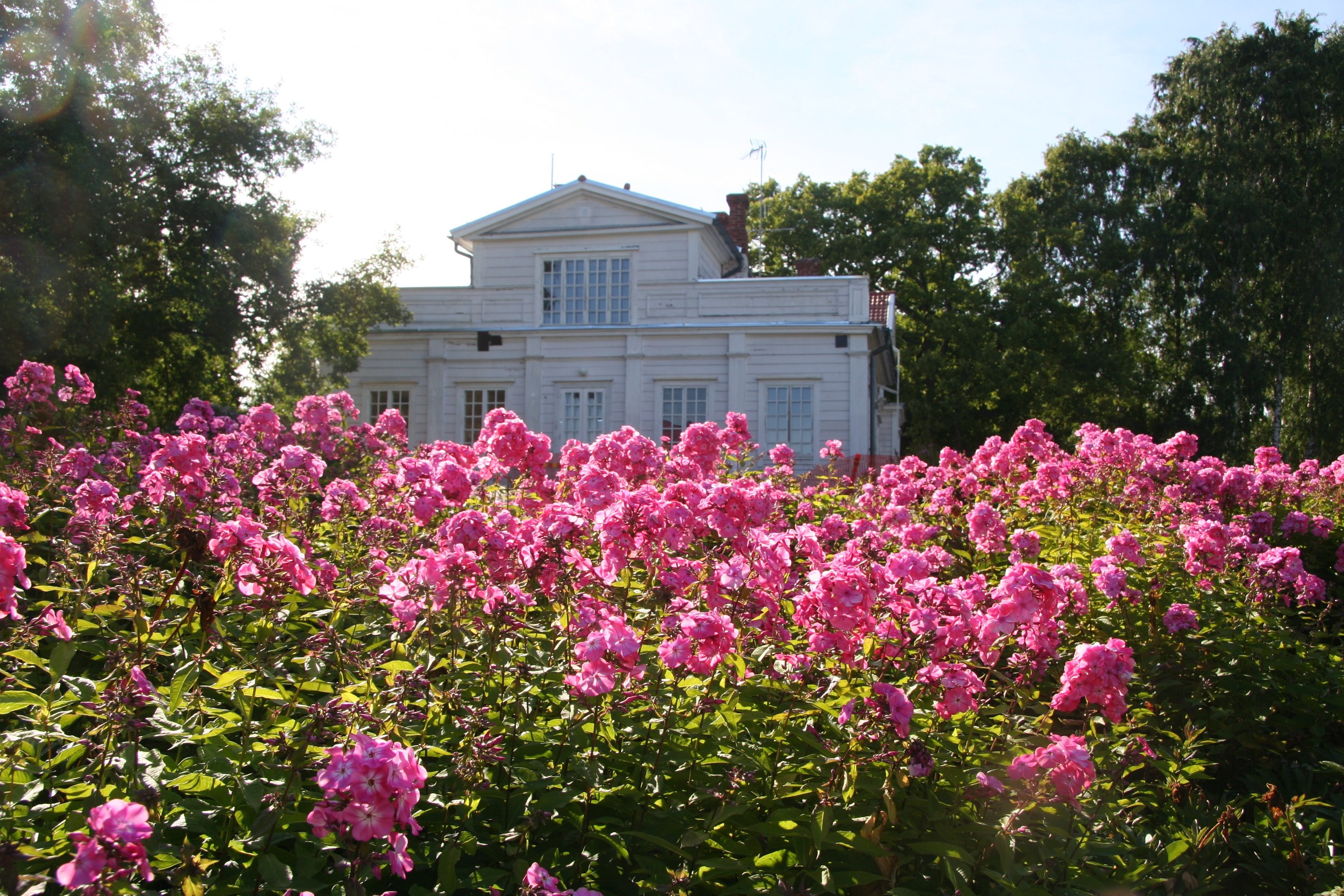 Annalan huvila, Helsinki